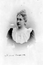 Bournat